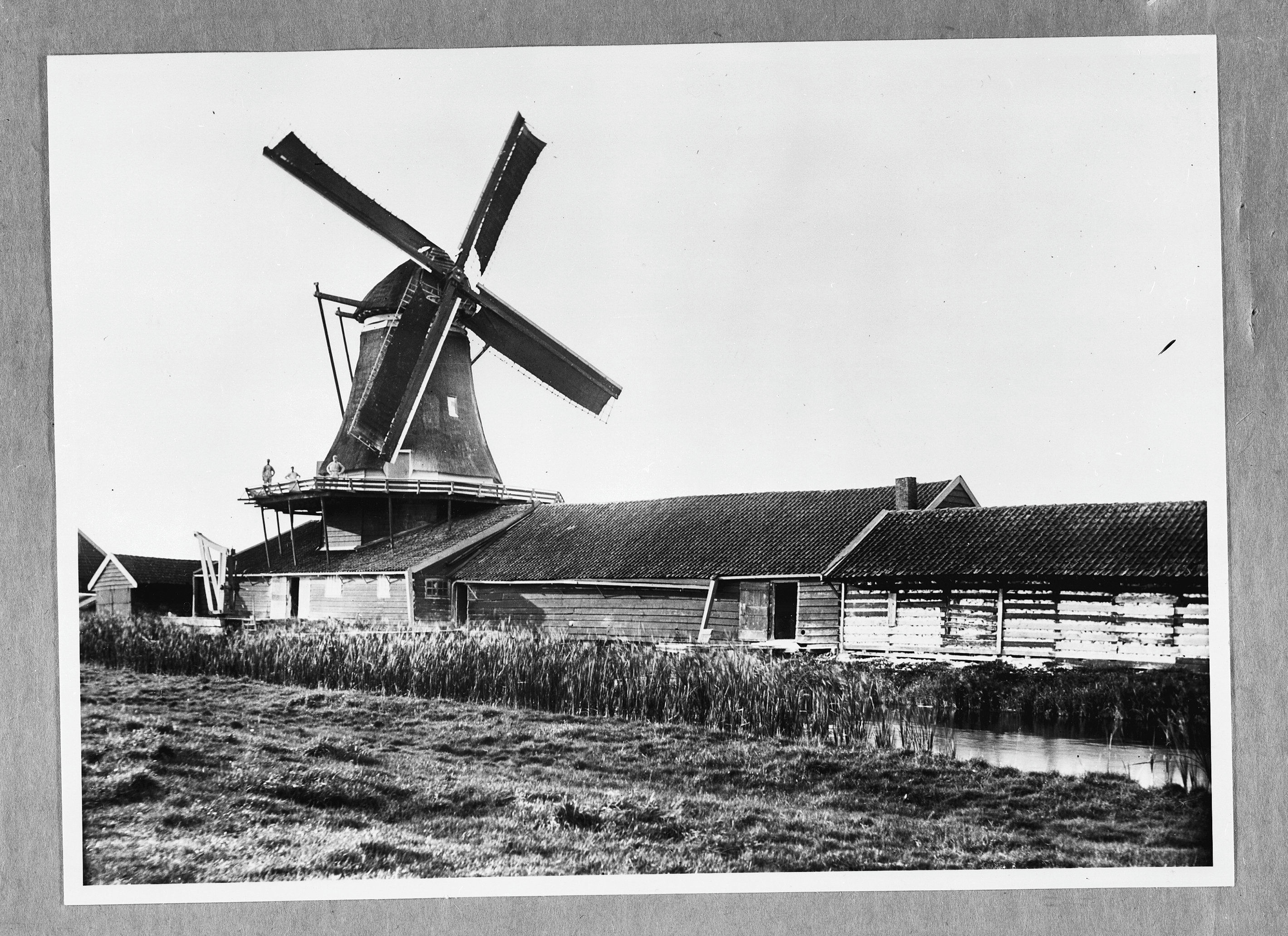 De Duinjager: De Duinjager schuin van voren gefotografeerd This is a possible Rijksmonument:Find the monument in the Monuments database:in ZaandamAll Rijksmonumenten in ZaandamIs this a Rijksmonument?YesNoMore information about this project and help. More images to work at in Category:Possible Rijksmonumenten.